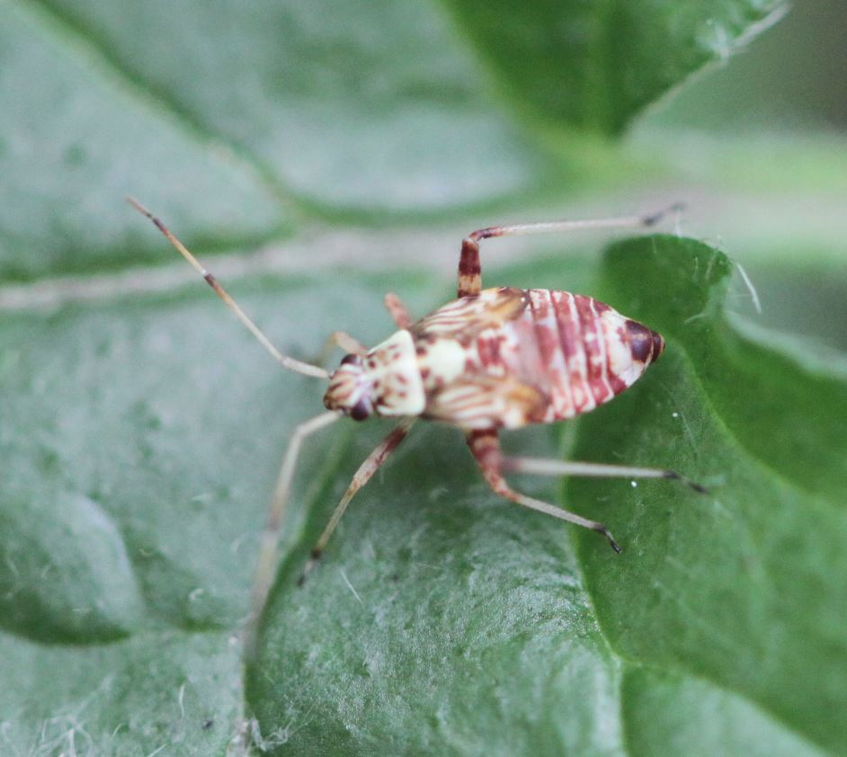 Nymphe der Eichen-Schmuckwanze (Rhabdomiris striatellus) am 23. Mai 2019 in einem Wald nahe Walldorf/Baden